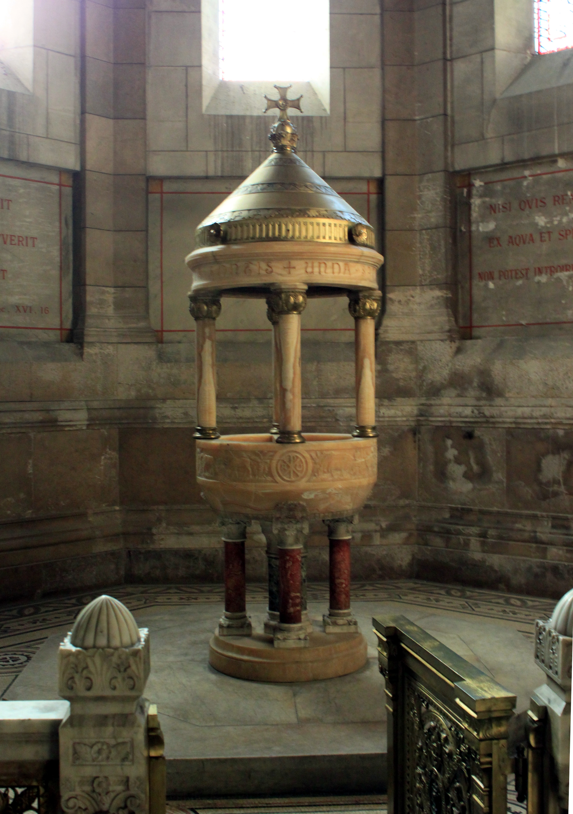 Cathédrale de la Major, Marseille, FRANCE